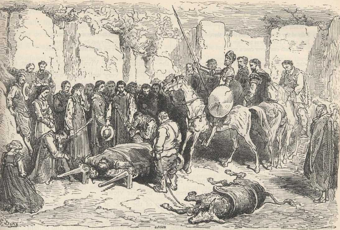 O funeral de Crisóstomo